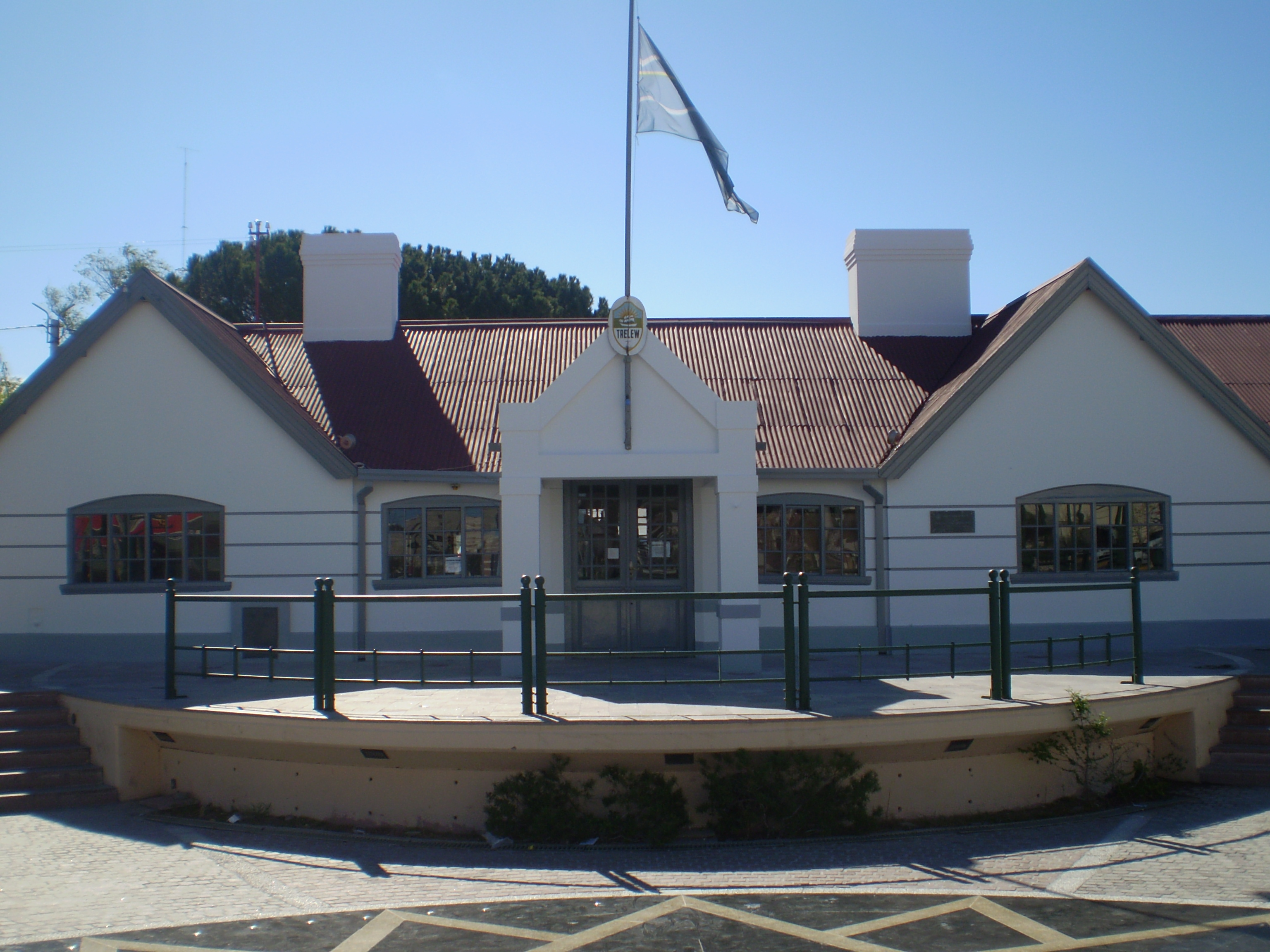 Ex Estación ferroviaria de Trelew. Parte frontal I. Hoy Museo Pueblo de Luis.